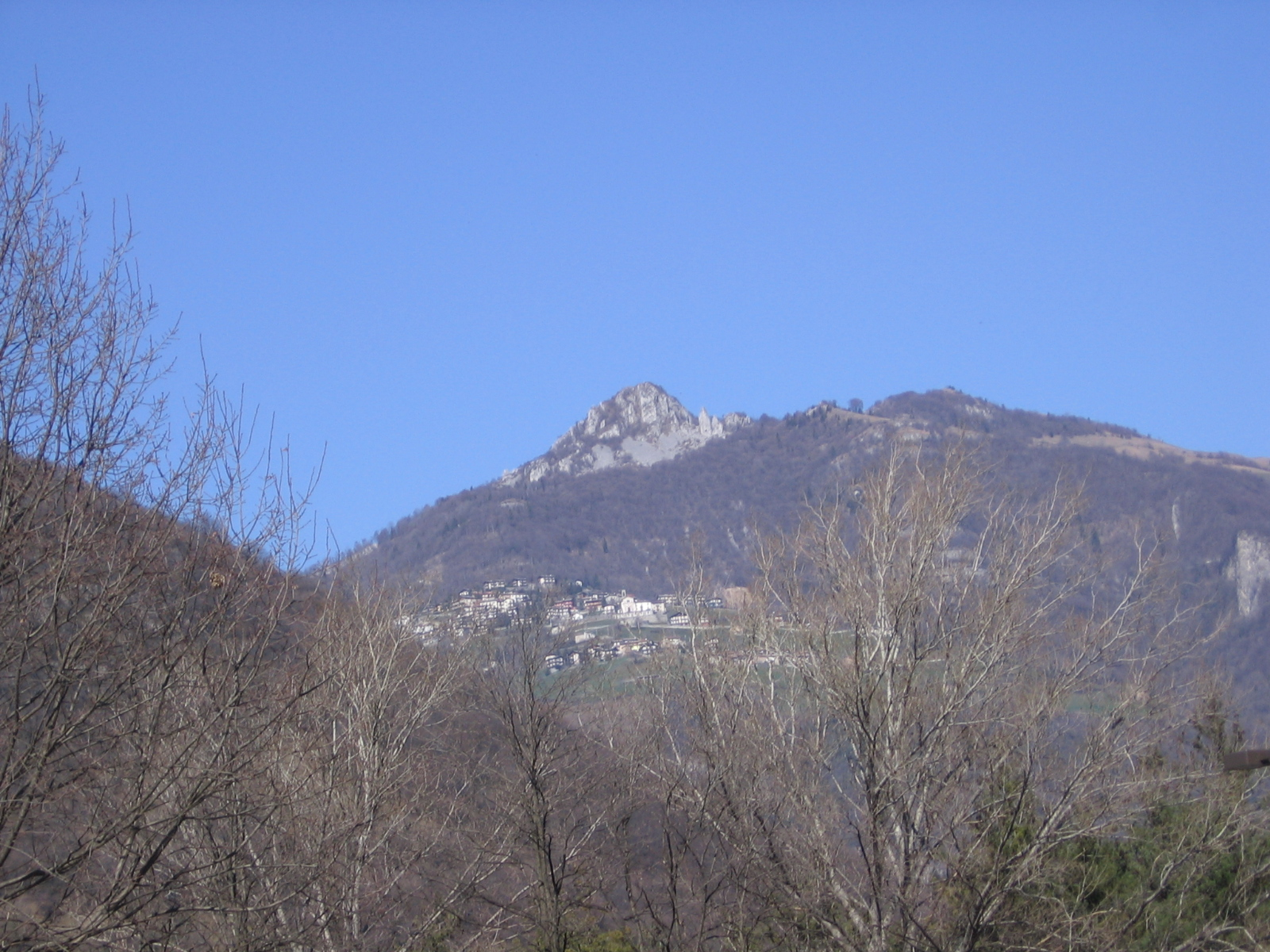 Monte Cornagera e Amora, Valle Seriana, Bergamo, Italy